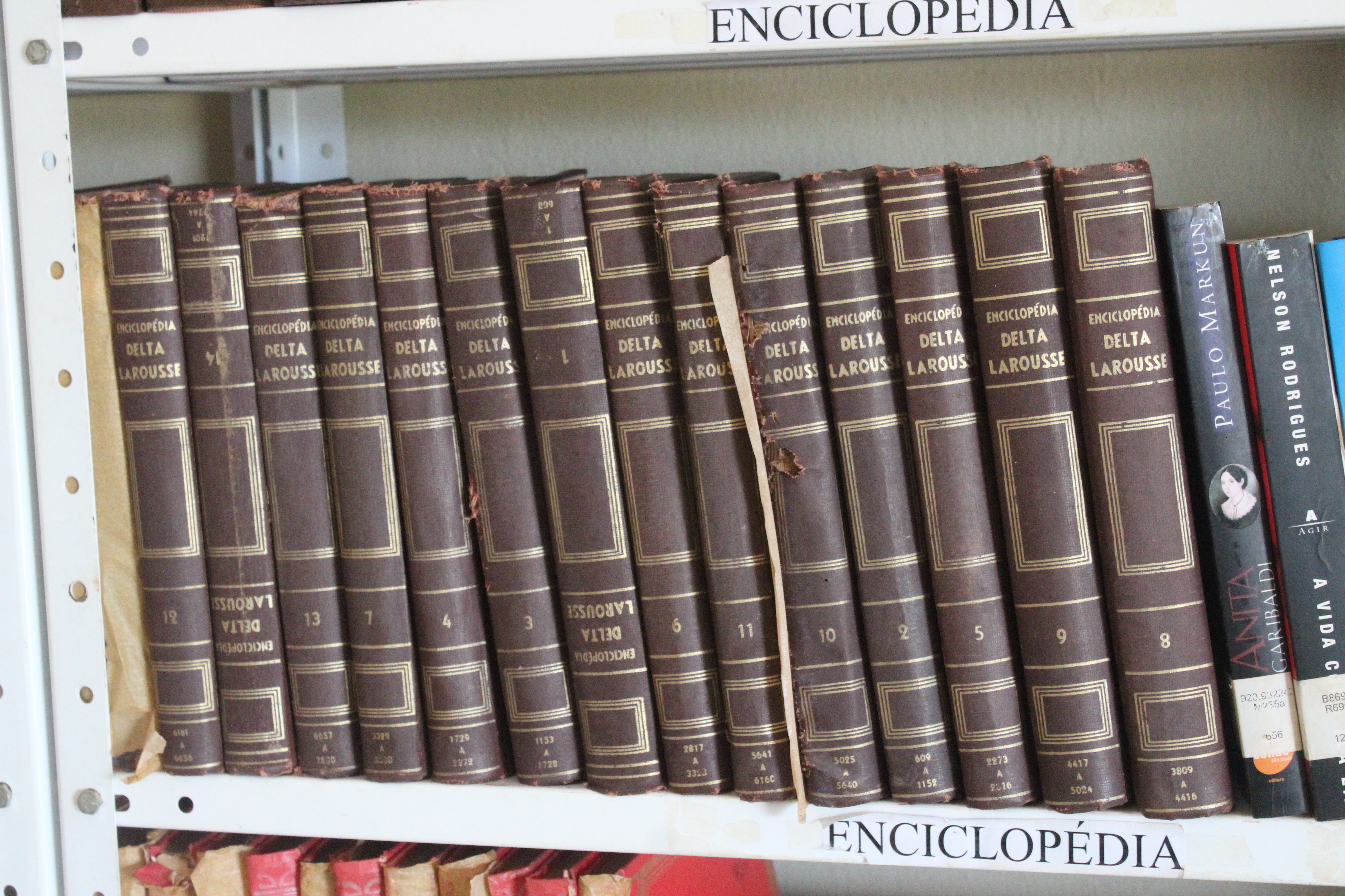 Coleção da enciclopédica Delta Larousse na Biblioteca Municipal de Juazeiro do Piauí.